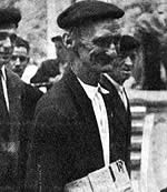 Txomin San Sebastian